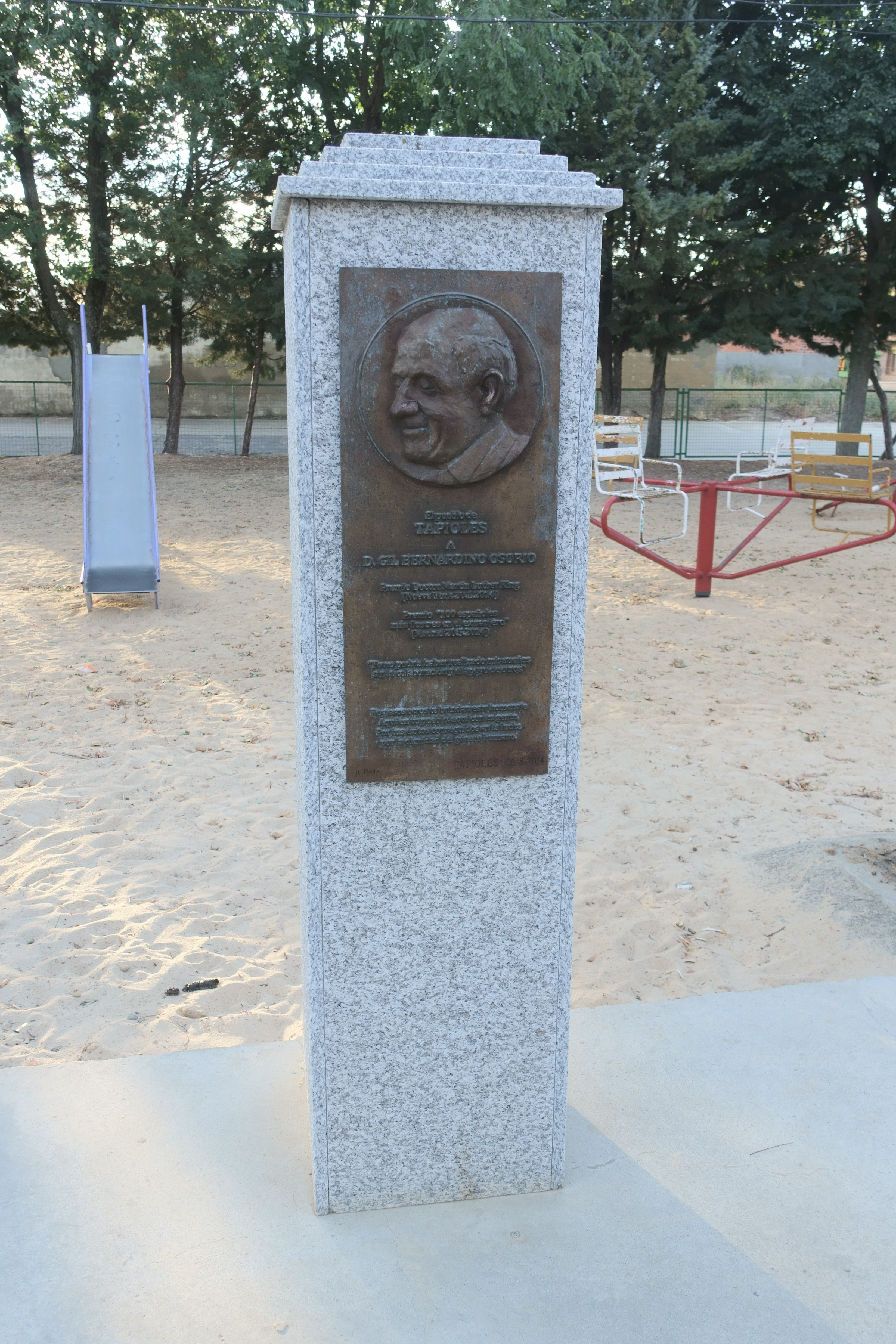 Monumento a Gil Bernardino Osorio en Tapioles (Zamora, España).